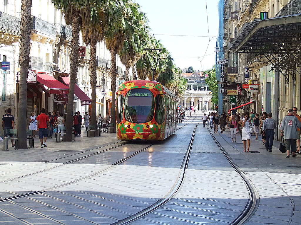 Tram de Montpellier ligne 2 direction Sablassou rue Maguelone